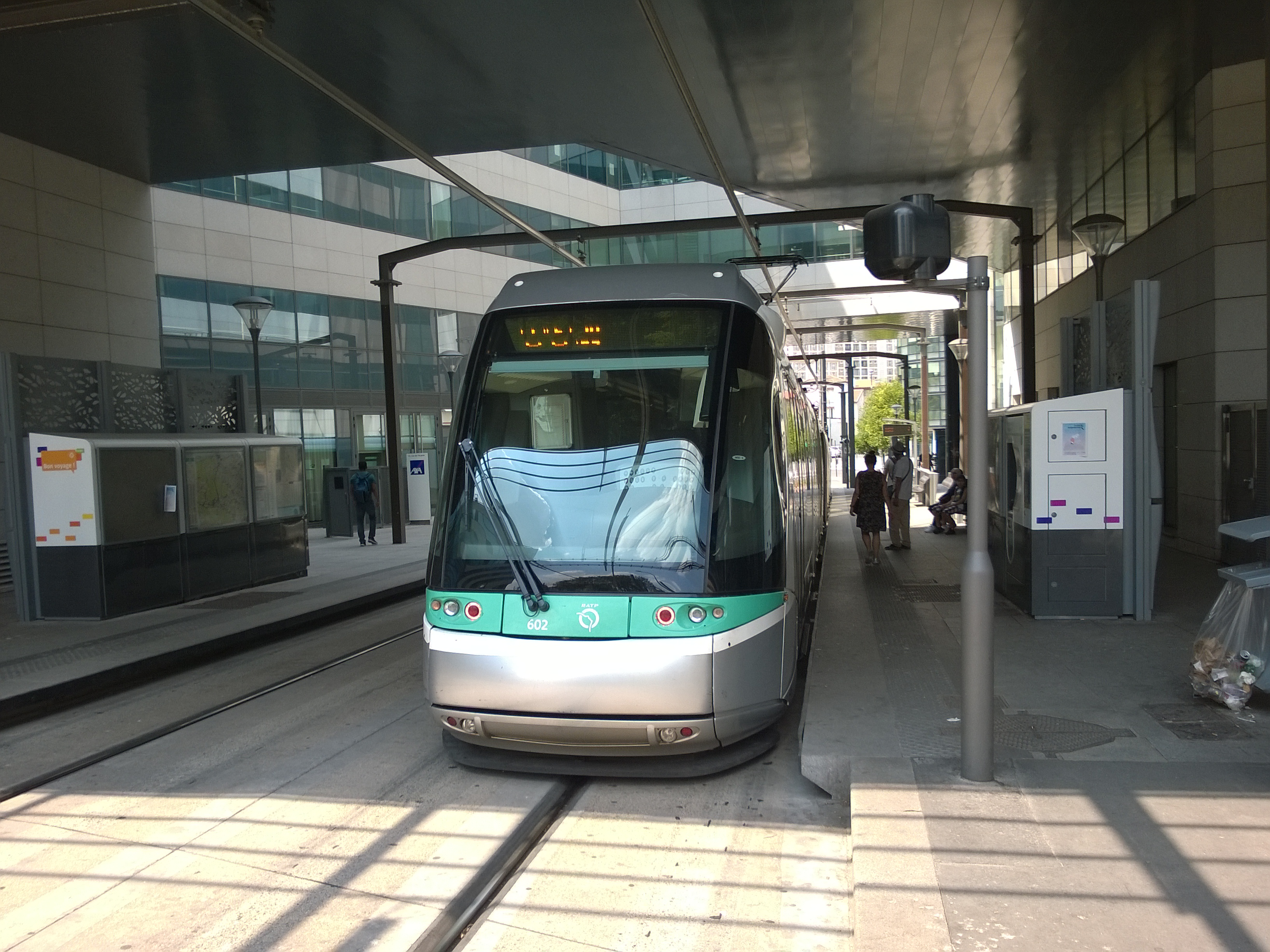 Station Châtillon - Montrouge, Châtillon (Hauts-de-Seine, France).Translohr STE6 de la ligne 6 en attente.